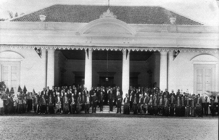 Foto. Openbare vergadering op 31 augustus 1927 te Bondowoso, Oost-Java